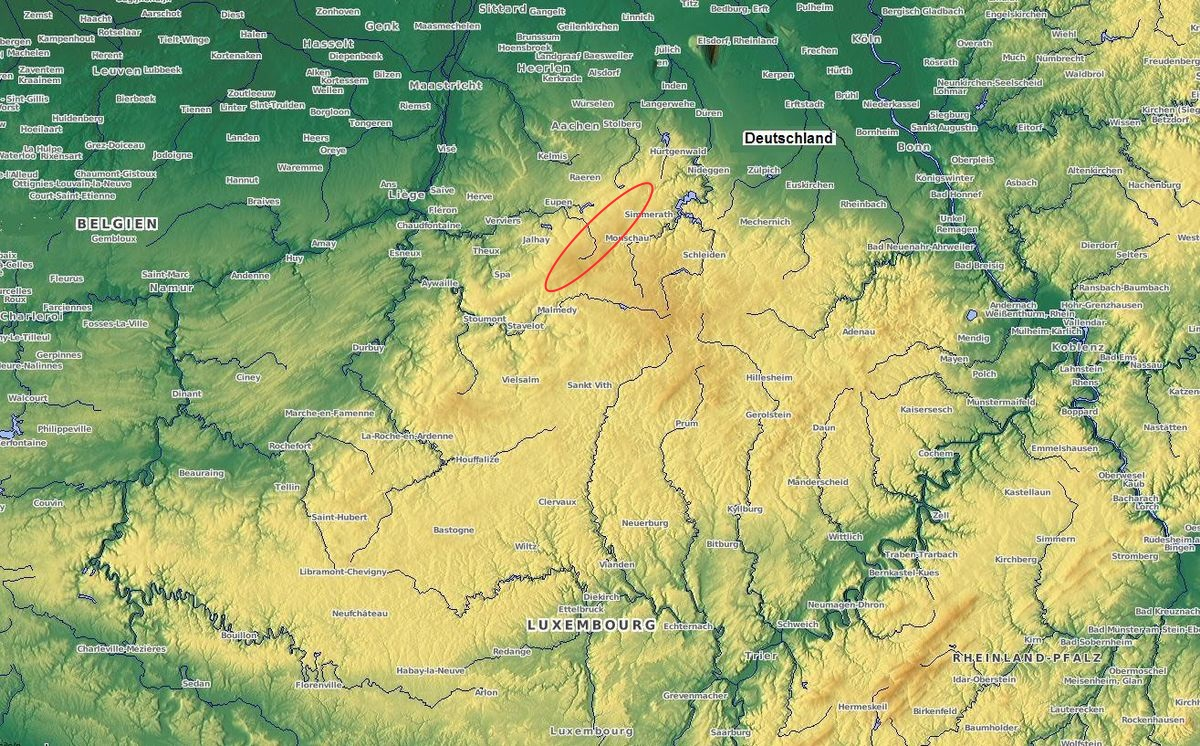 Lage des Hohen Venn im grenzüberschreitenden Raum zwischen Belgien und Deutschland